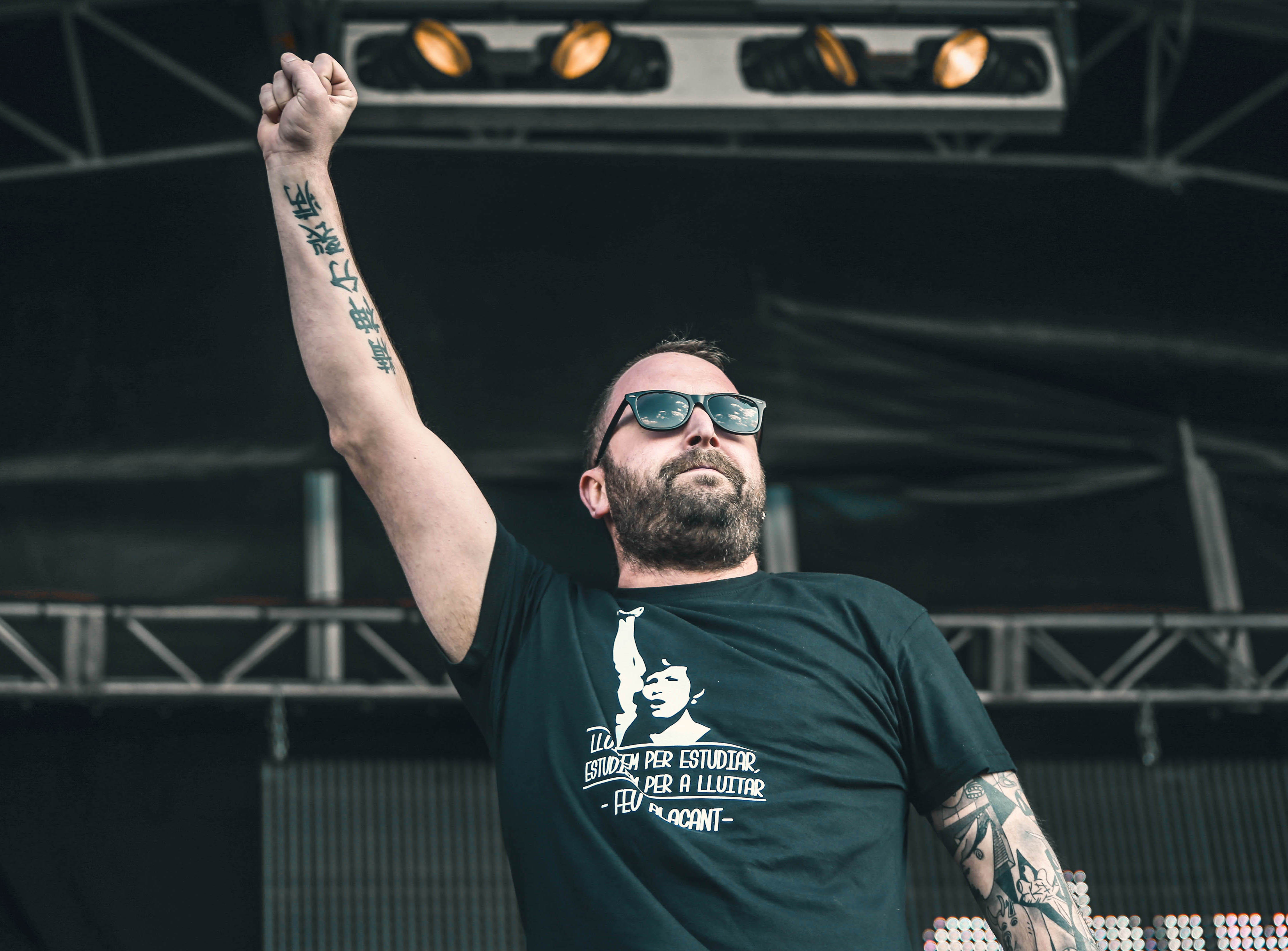 Toni el Sucio de los Chikos del Maíz en el Paellas Festival Alicante 2016